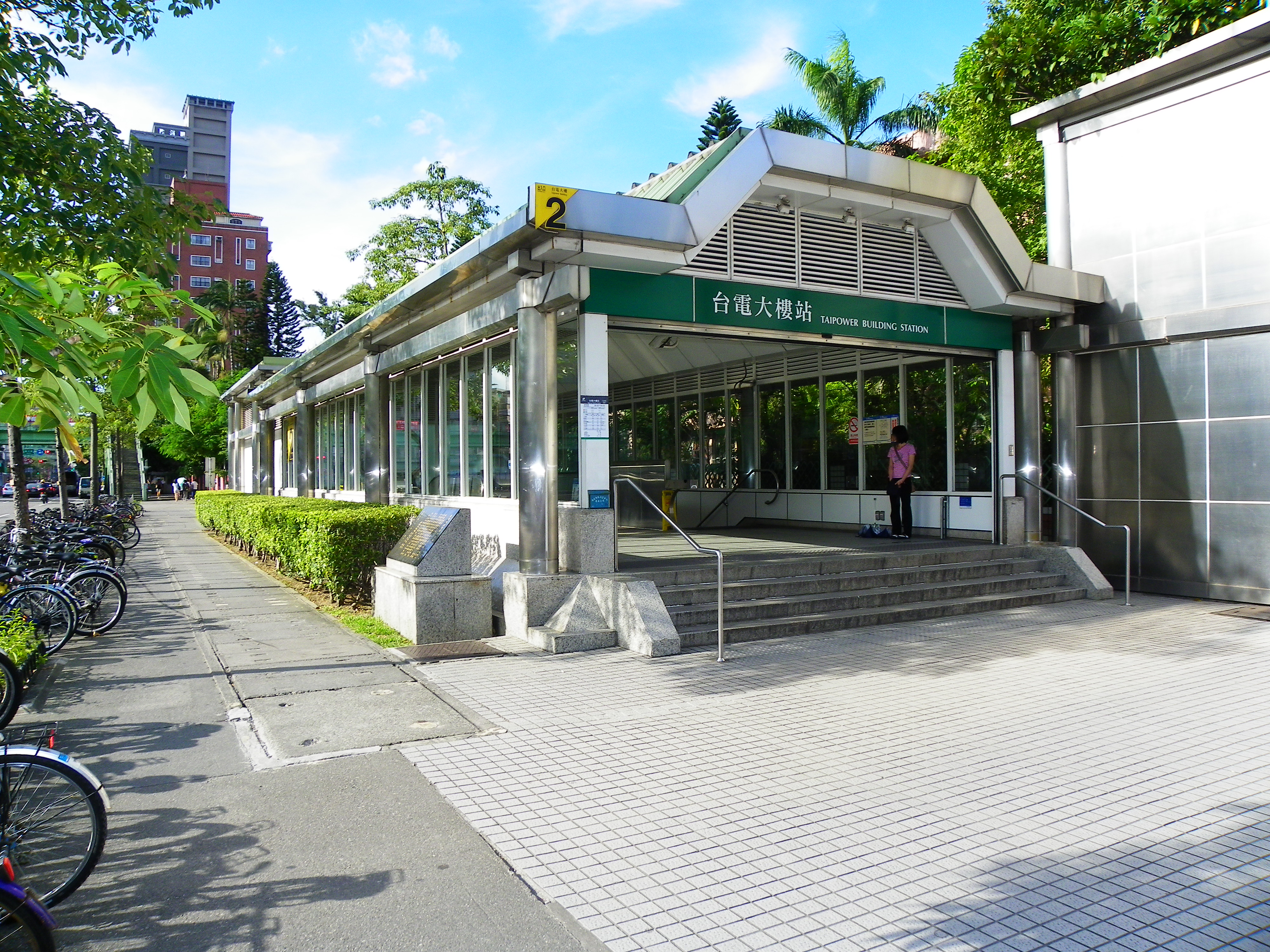 台北捷運新店線台電ビル駅2号出口と新店線減圧症労工紀念碑。